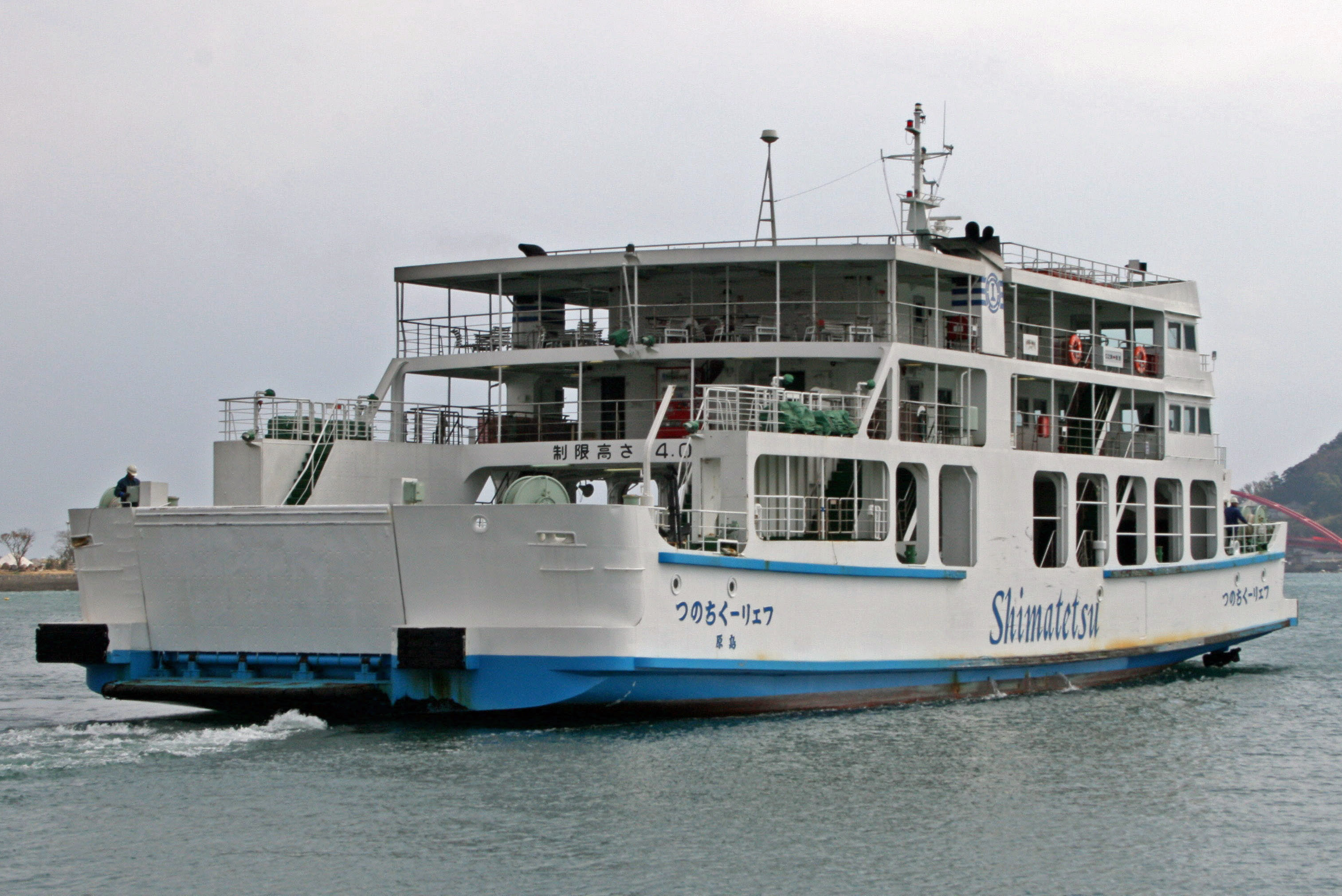 島鉄フェリー(口之津港（長崎県南島原市)) Shimatetsu Ferry, Nagasaki Prefecture